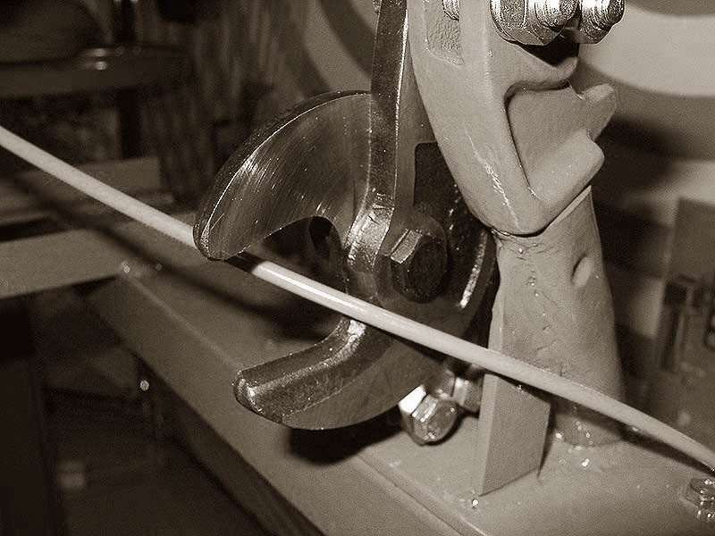 Кабелерез в работе